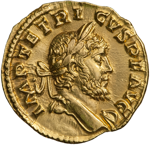 Ауреус. Тетрик I Старший. Ок. 271—274 гг. (аверс). Надпись IMP TETRICVS PF AVG. Бюст Тетрикуса, вправо; на голове лавровый венок.